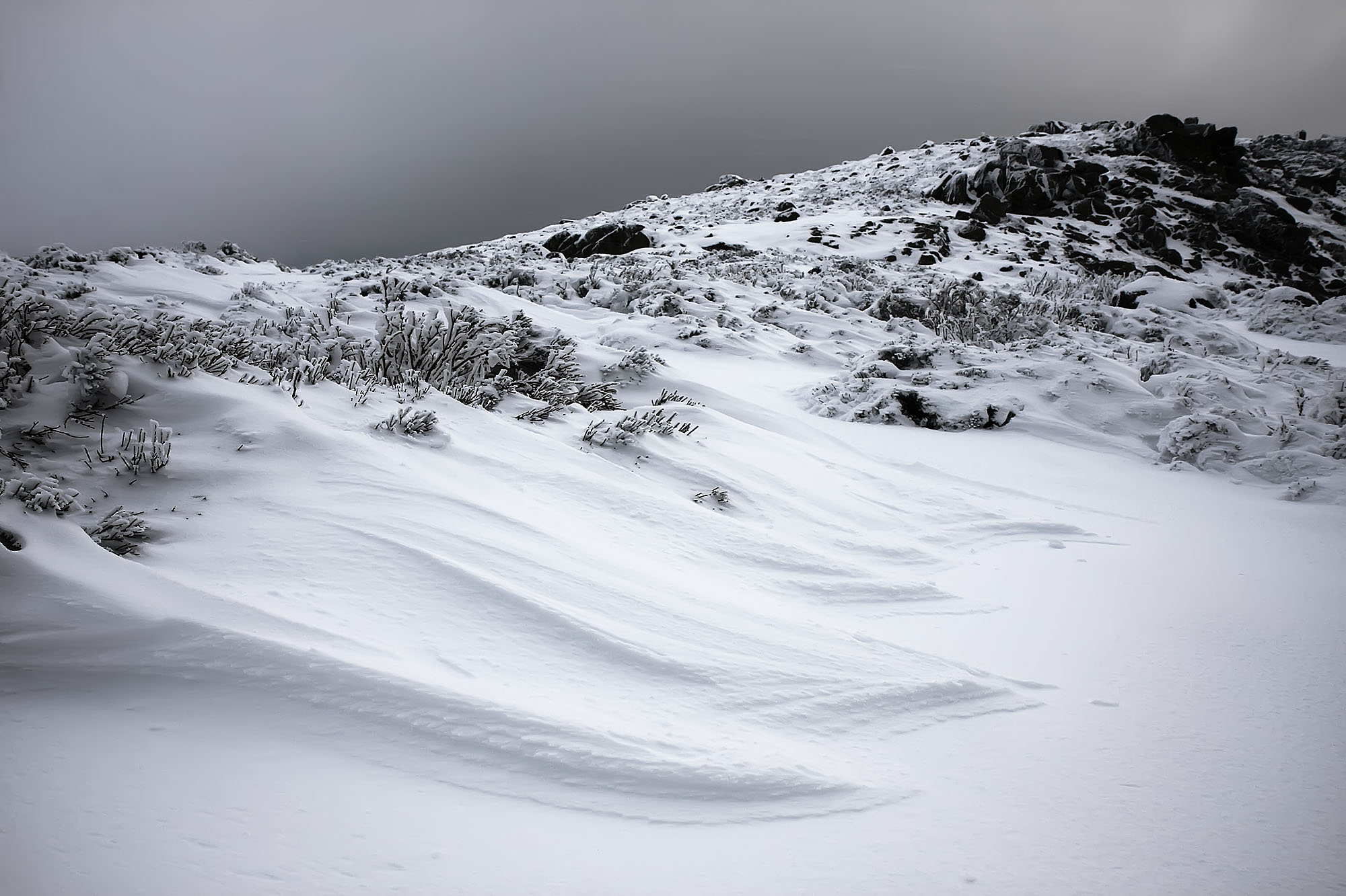 En lo alto del puerto de la Cabrilla, Sierra de Gredos.